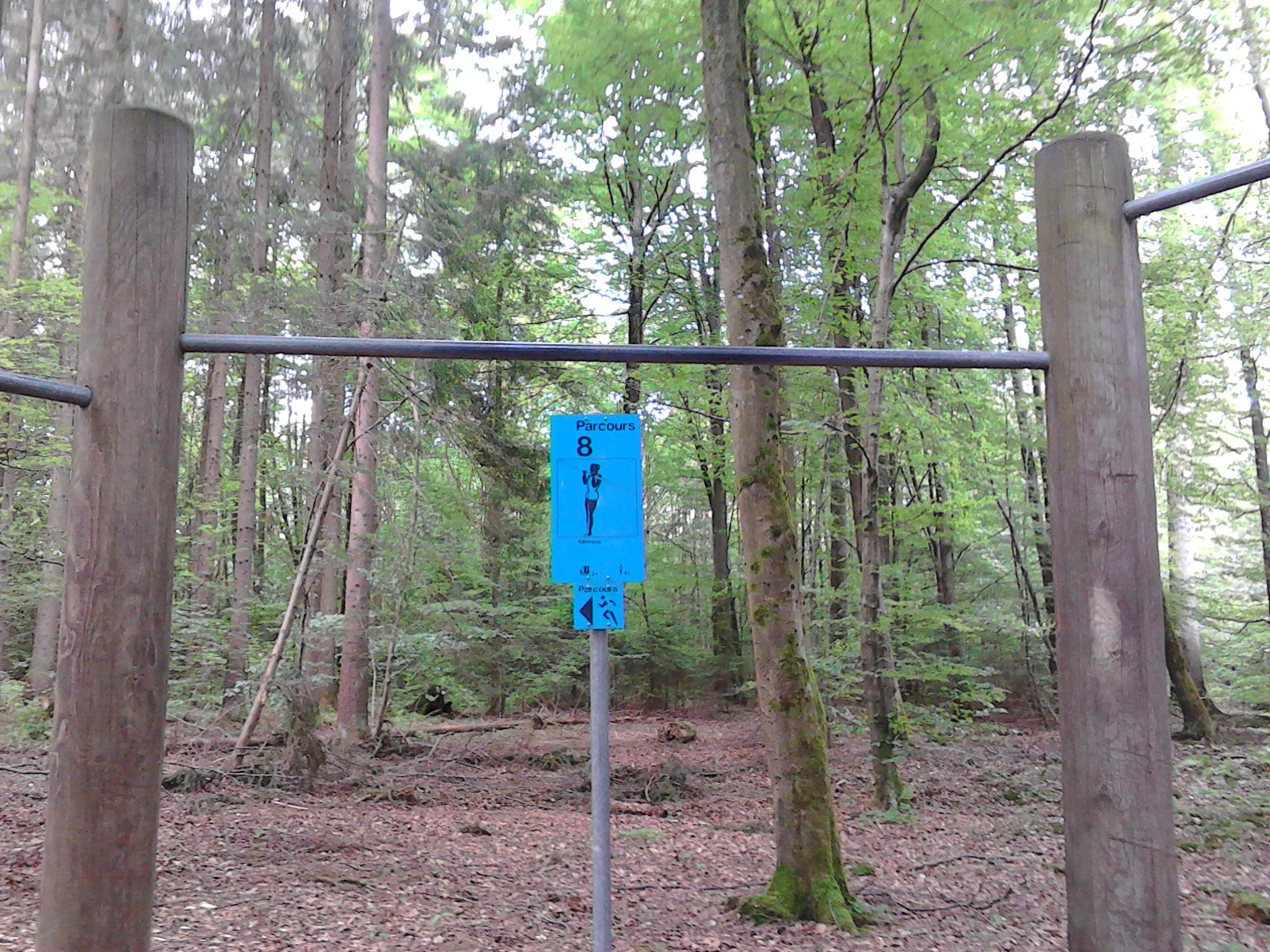 Klimmzugstangen am Trimm-Dich-Pfad im Grünwalder Forst.